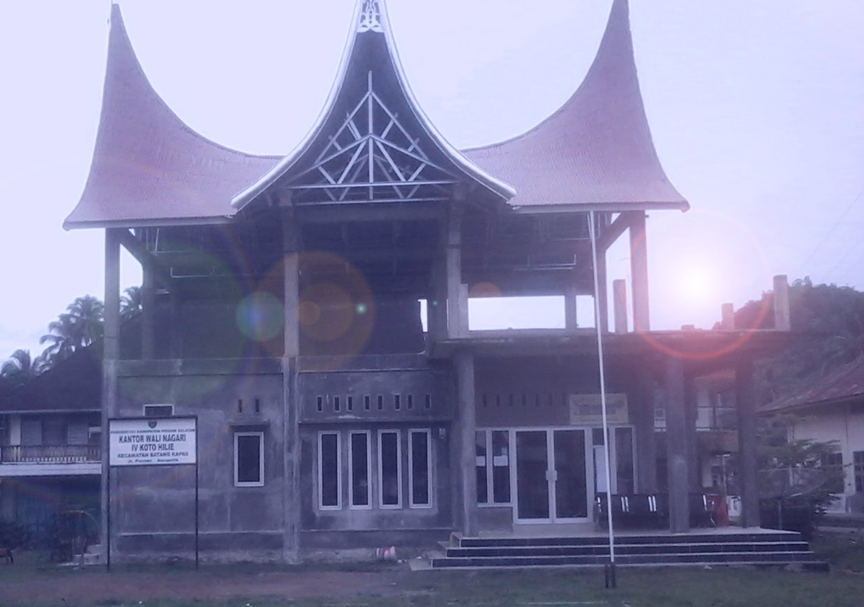 Kantor Wali Nagari IV Koto Hilie masih dalam tahap kelanjutan pembangunan di Medan Nan Bapaneh Pasar Kuok